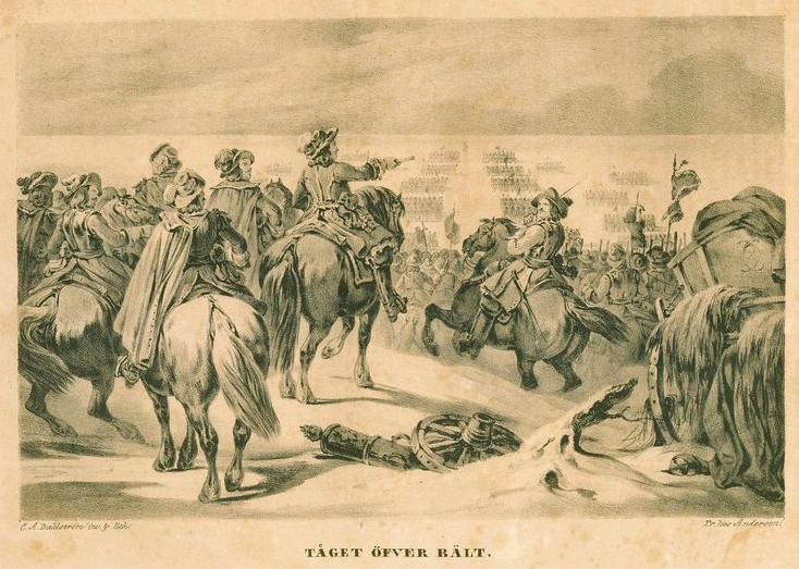 Tåget öfver Bält. Från "Teckningar ur Sveriges historia" av Carl Andreas Dahlström.